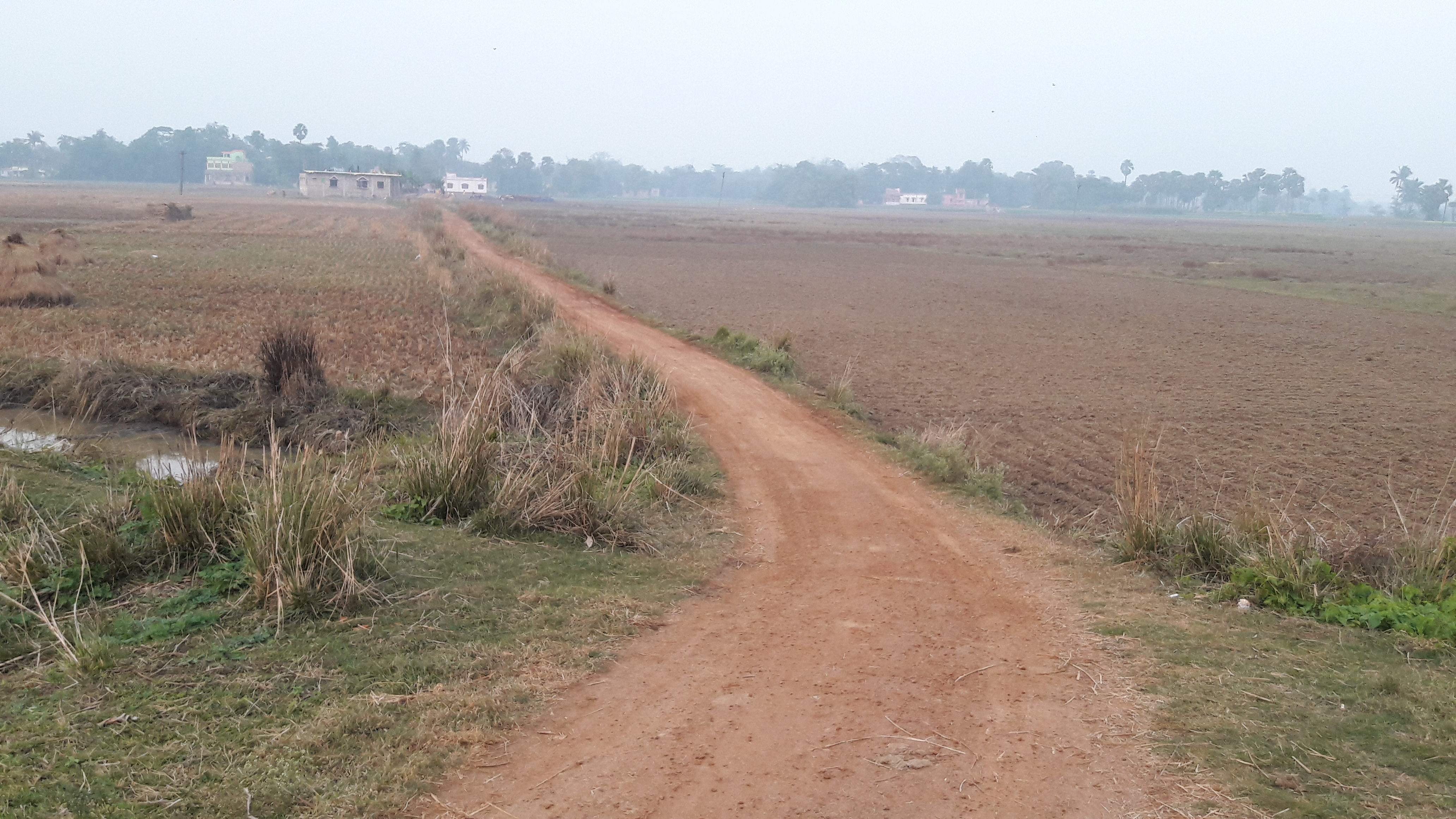 লাল মাটির রাস্তা